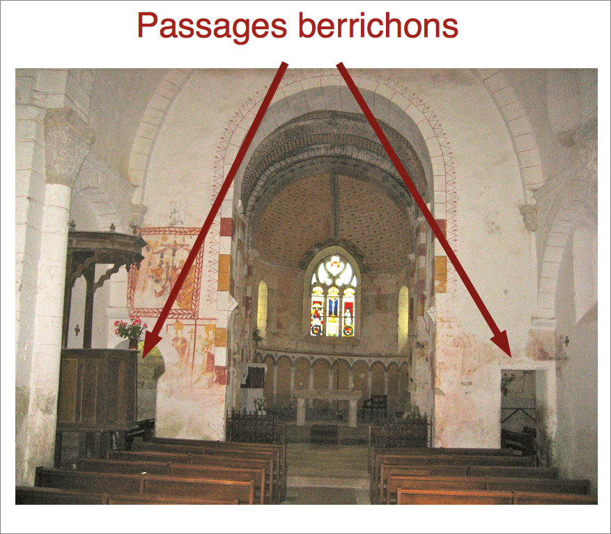 L'église Saint-Georges de Saint-Jeanvrin, avec les deux passages berrichons